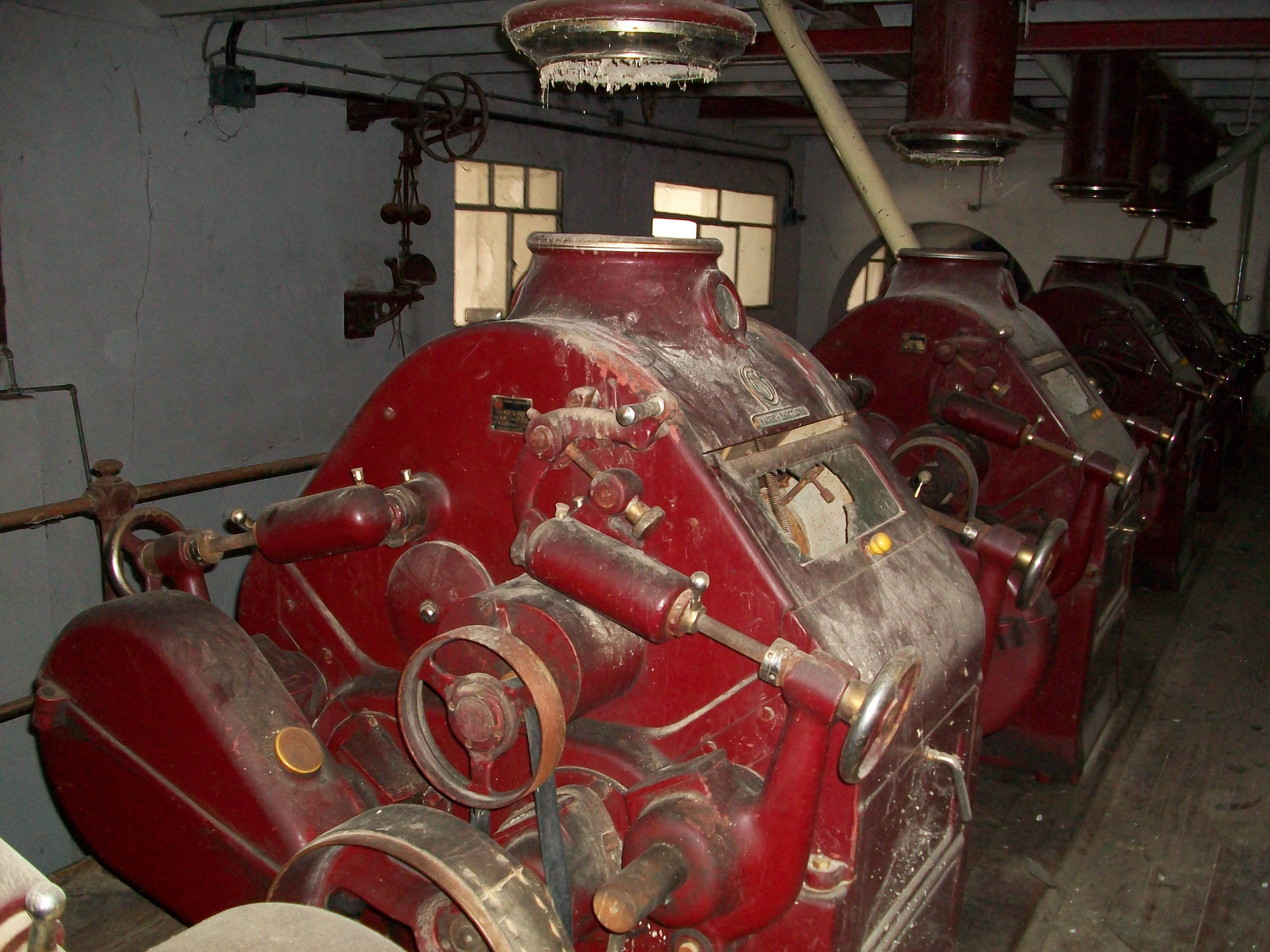 Maquinaria del interior de la fábrica de harina "La Cubeta" en Pedro Muñoz.